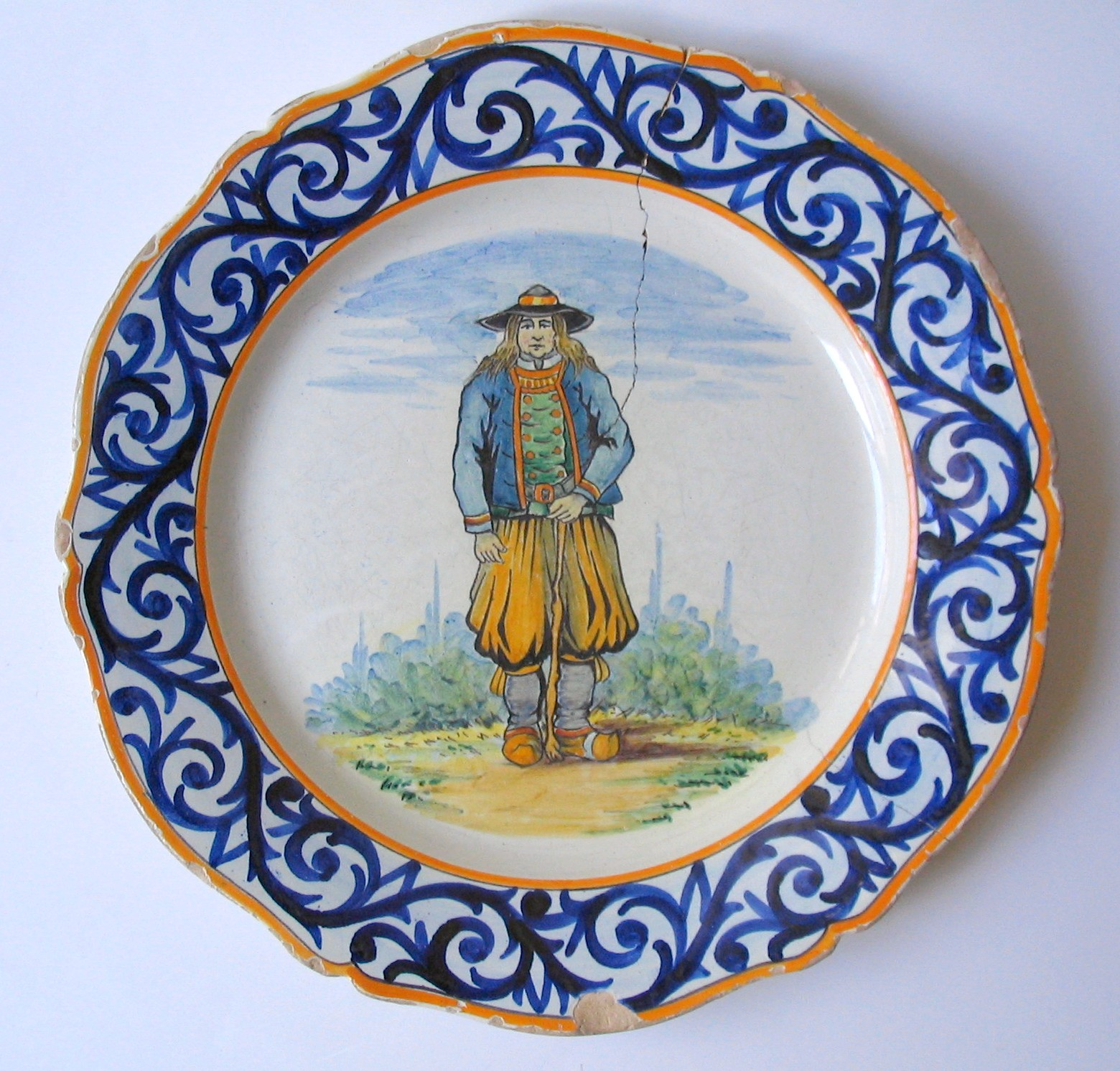 Faïence de Quimper, signé Henriot vers 1910